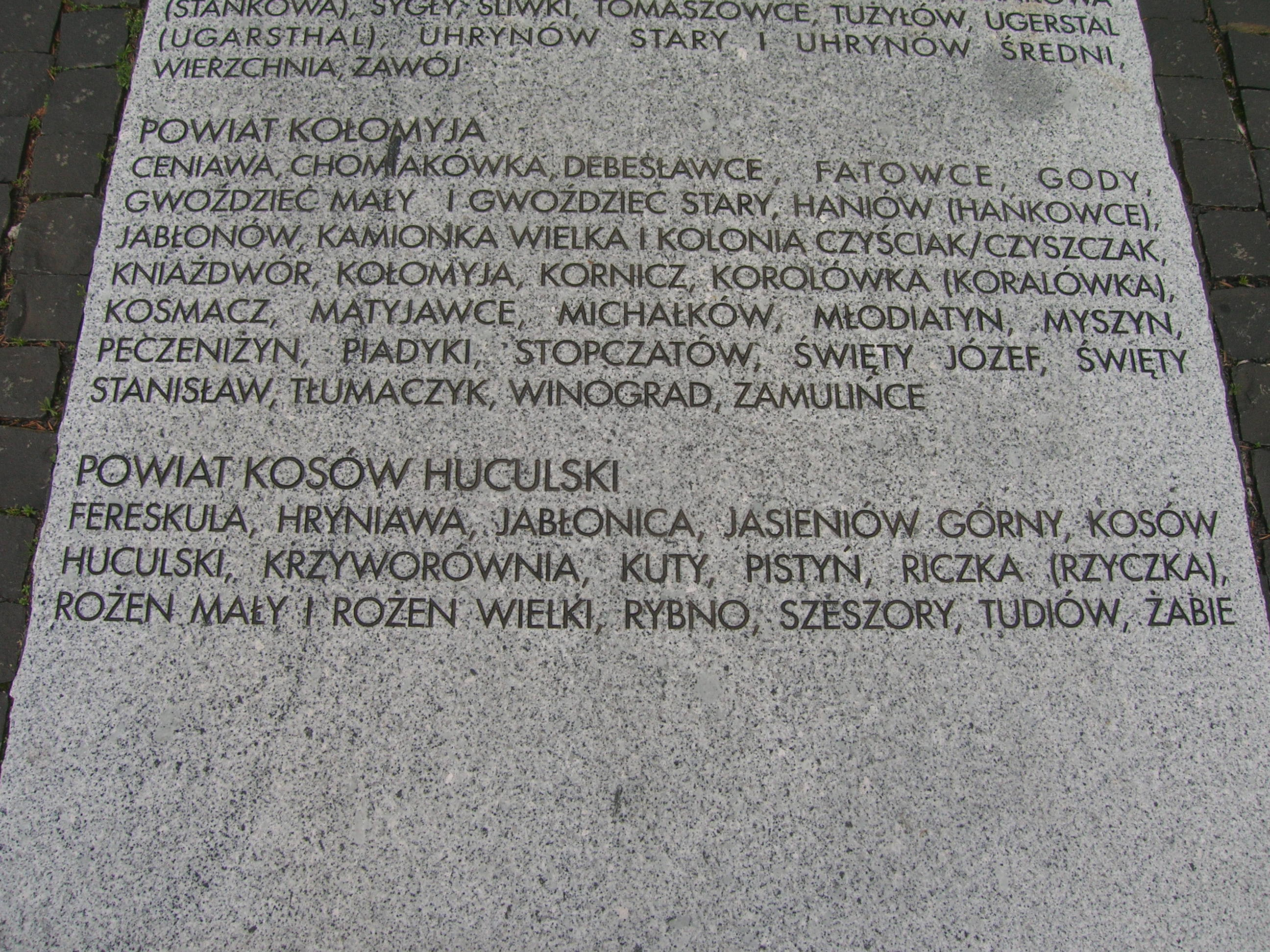 tablica powiaty Kołomyja i Kosów Huculski